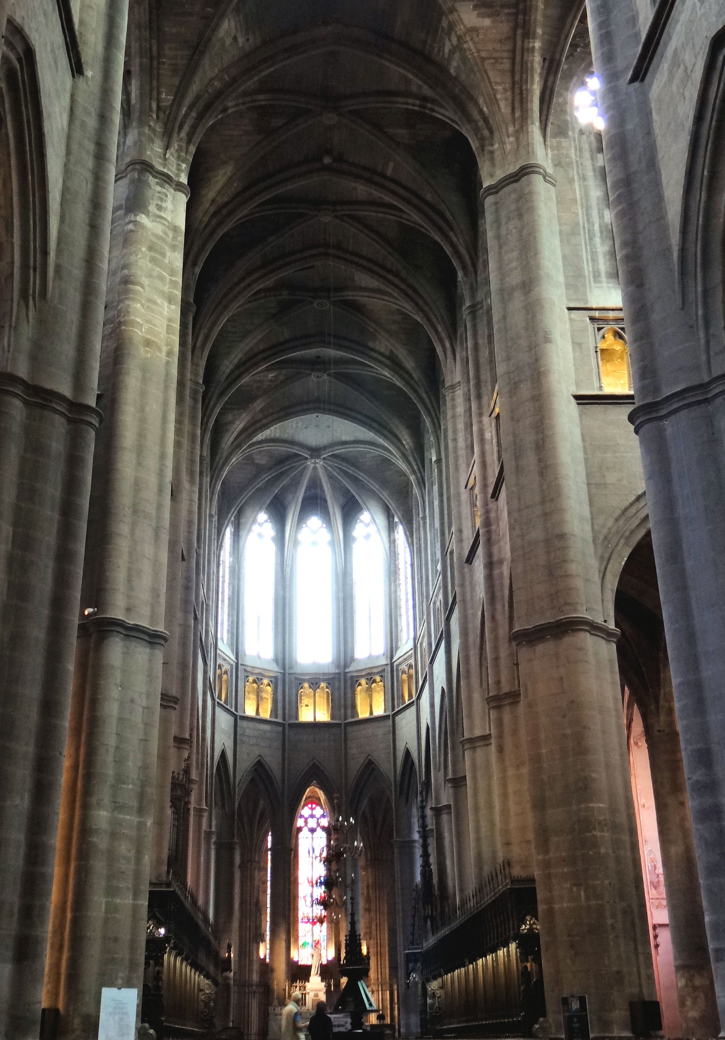 Rodez - Cathédrale de Rodez - Choeur